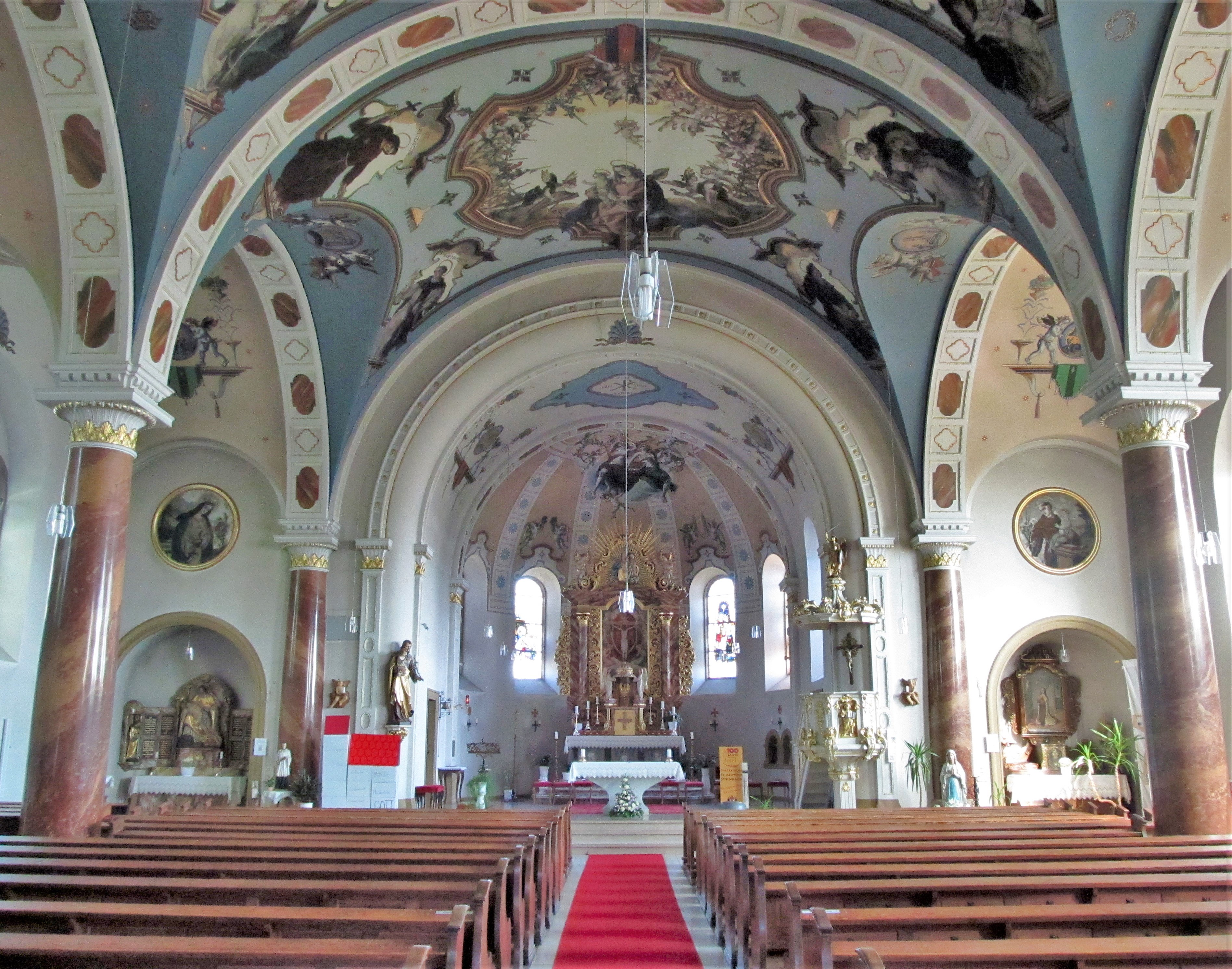 Blick ins Innere der katholischen Pfarrkirche St. Aloysius in Steinbach, einem Stadtteil von Lebach, Saarland